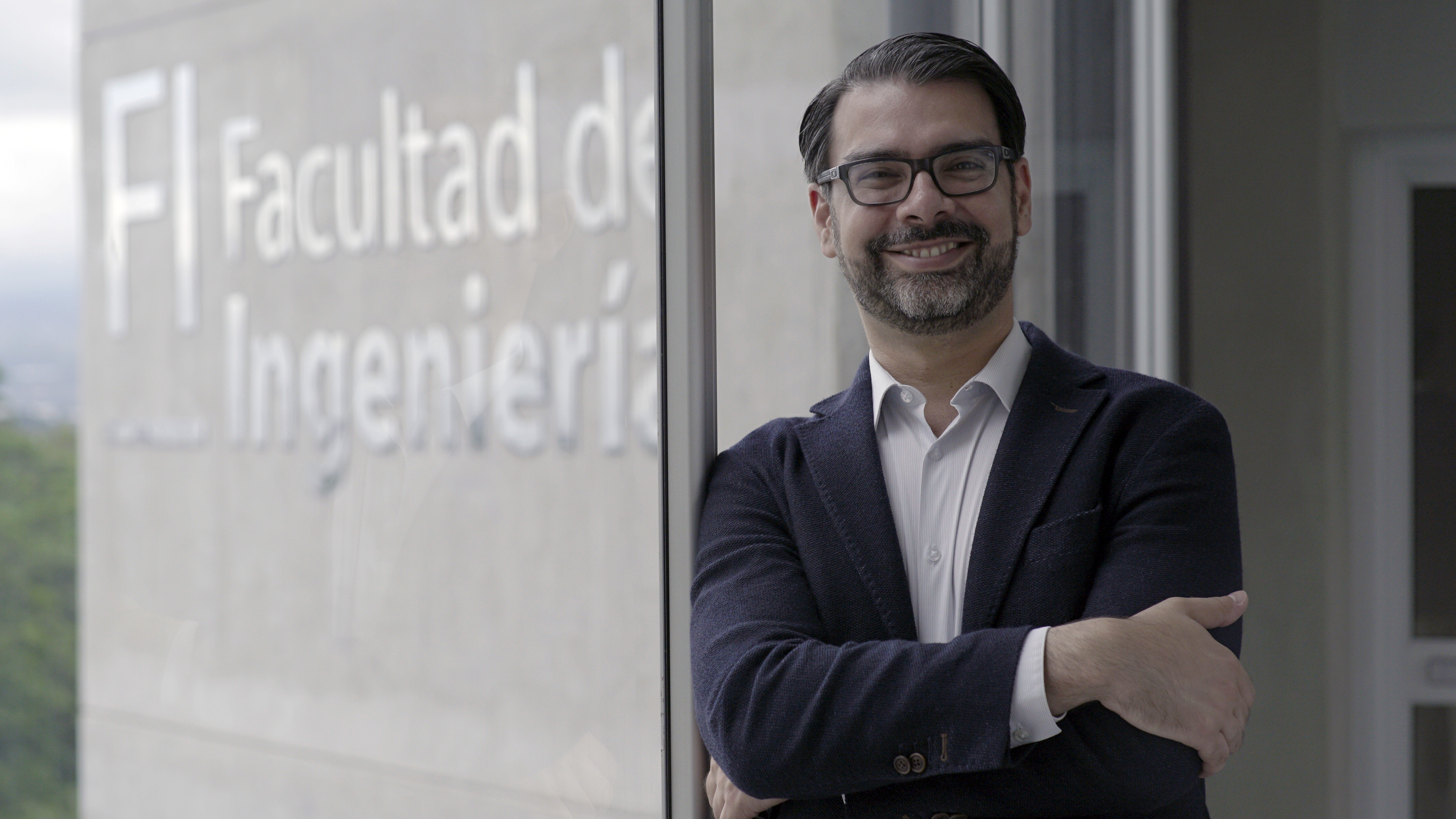 Dr. Orlando Arrieta. Catedrático universitario, investigador, ingeniero y administrador. Decano, Facultad de Ingeniería, Universidad de Costa Rica.